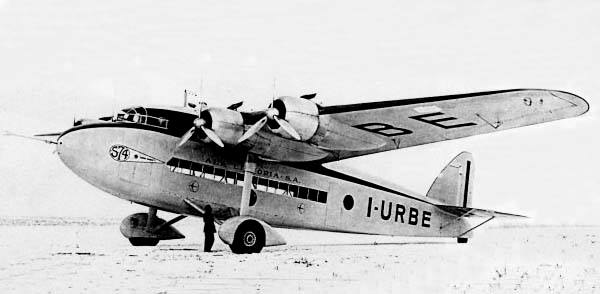 Aereo Savoia Marchetti S.74